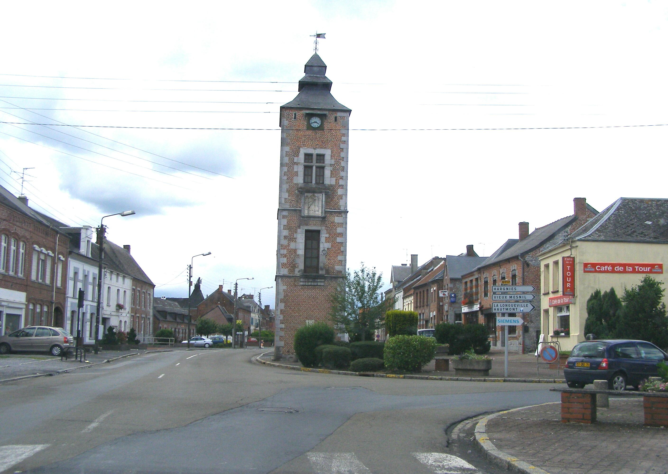 La tour du guet.